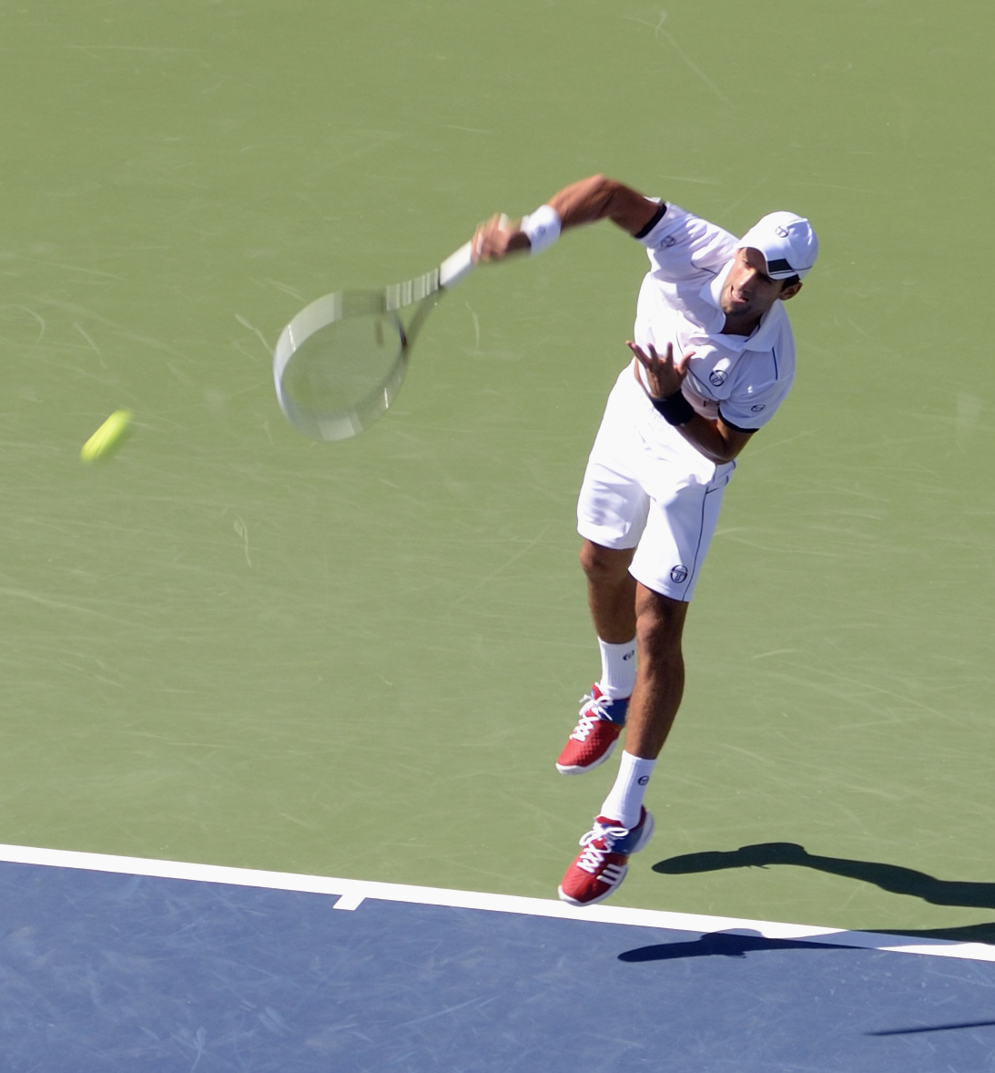 djoker serve